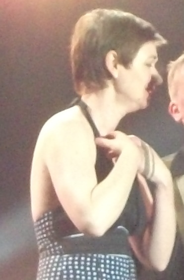 Paris Combo на закрытии Французской Весны 2012 в Киеве